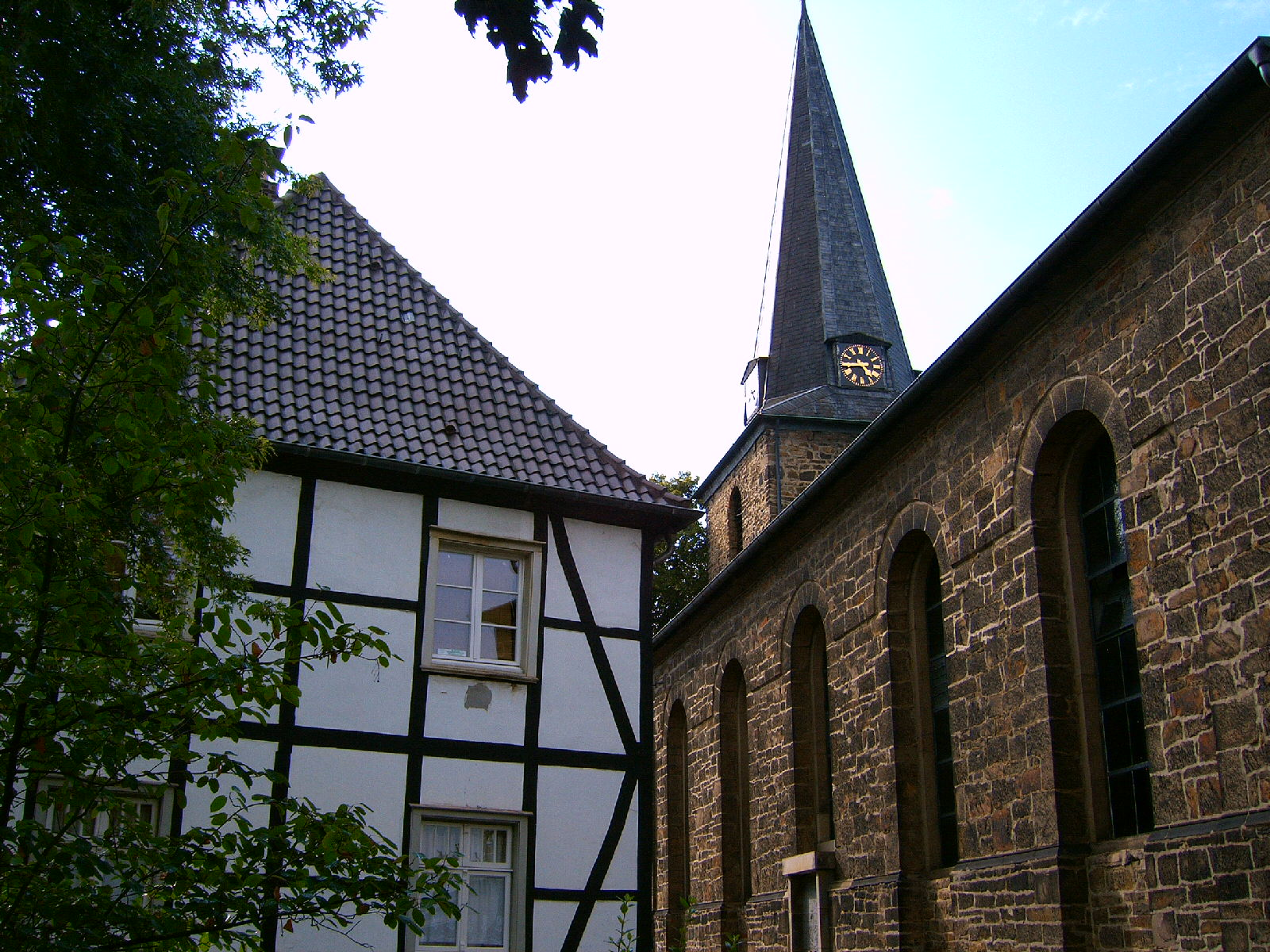 Ev. Kirche und Altstadtkern Westhofen, Schwerte, Deutschland